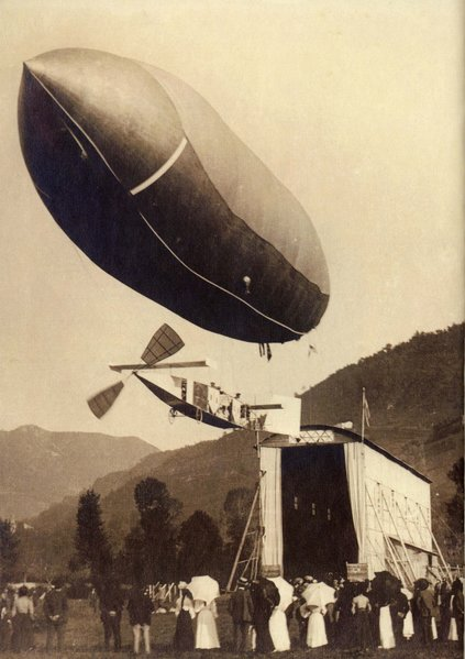 L'Aeronave "Italia" (1905, tratto dal libro Almerico da Schio di Giorgio Evangelisti).